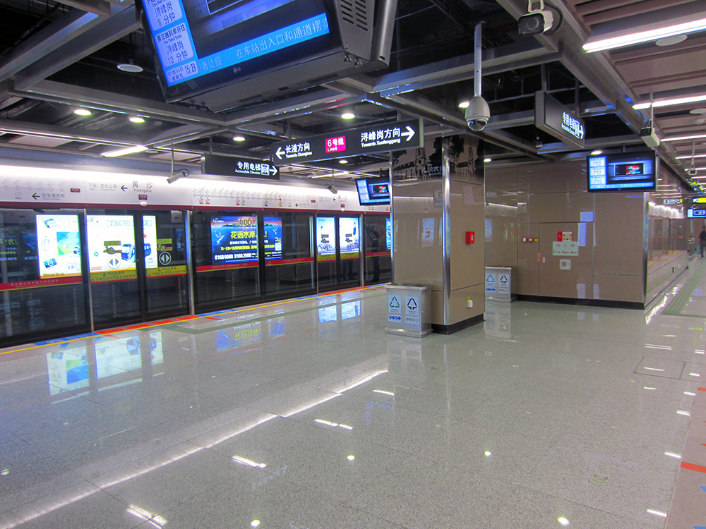 黃沙站6號線站台